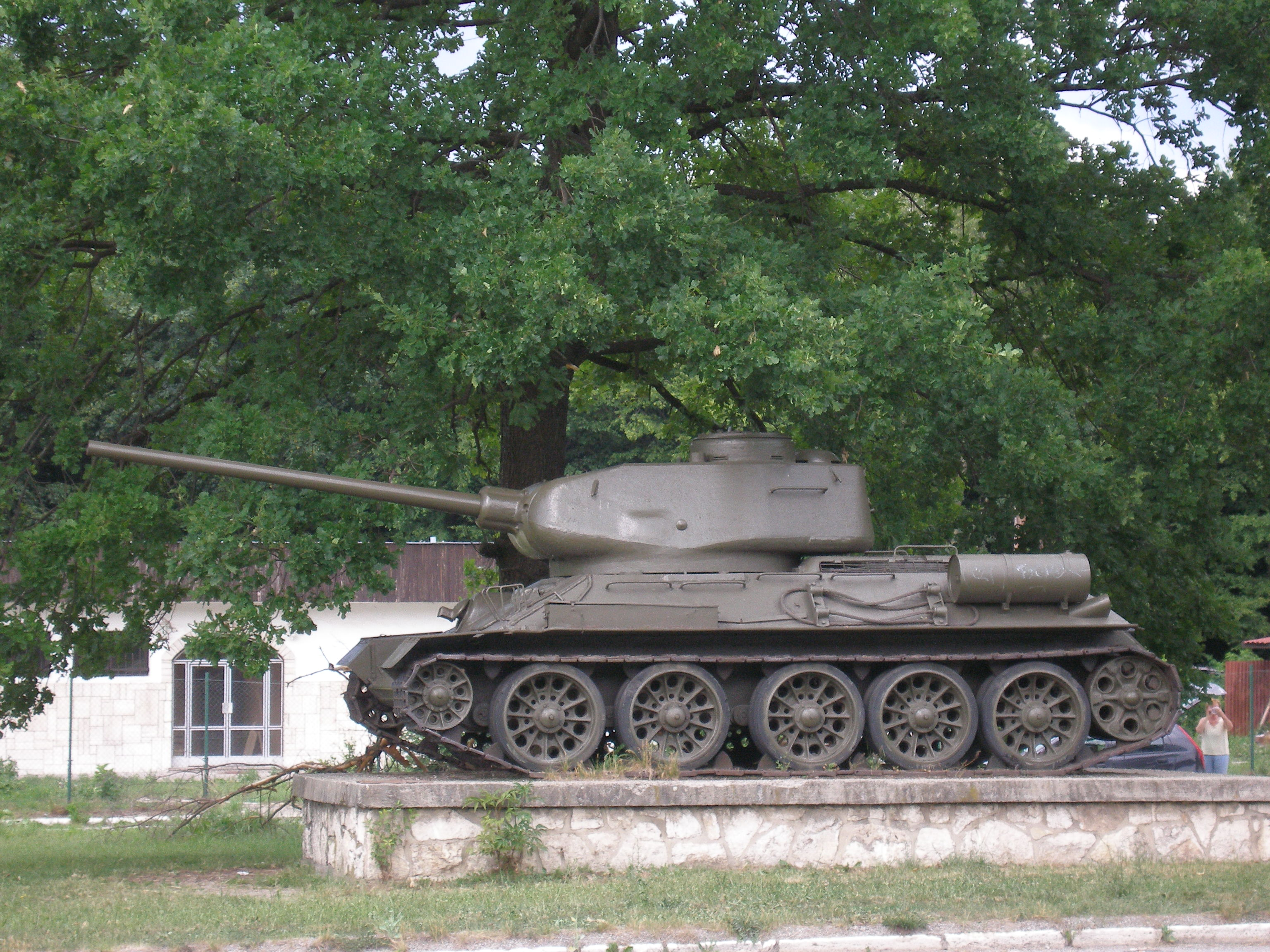 Vojenský pamätník obetiam Druhej svetovej vojny na Dargove,okr.Košice-okolie